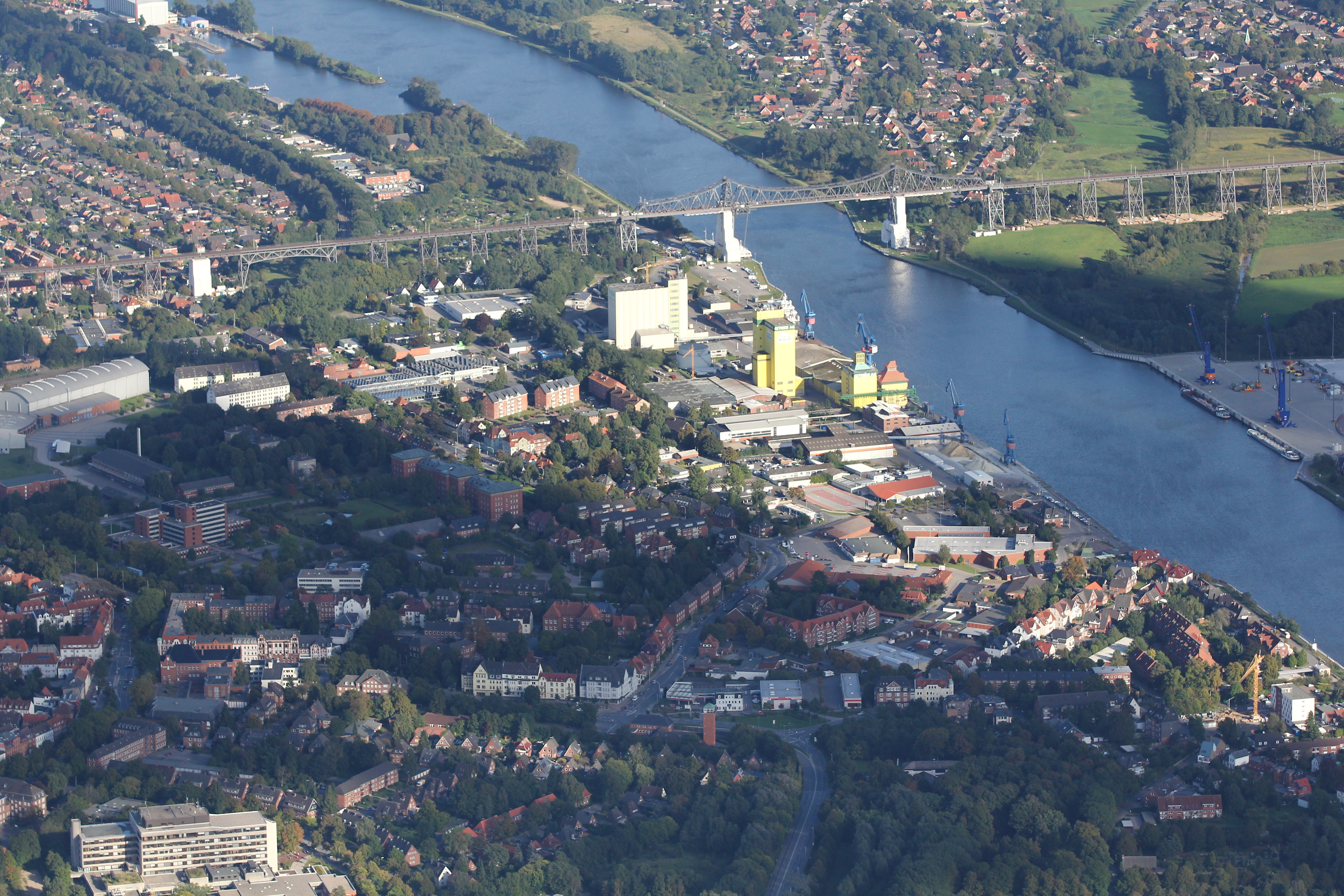 Luftbildaufnahme Rendsburger Hochbrücke, Rendsburg, Schleswig-Holstein, Deutschland, Blick nach Osten.